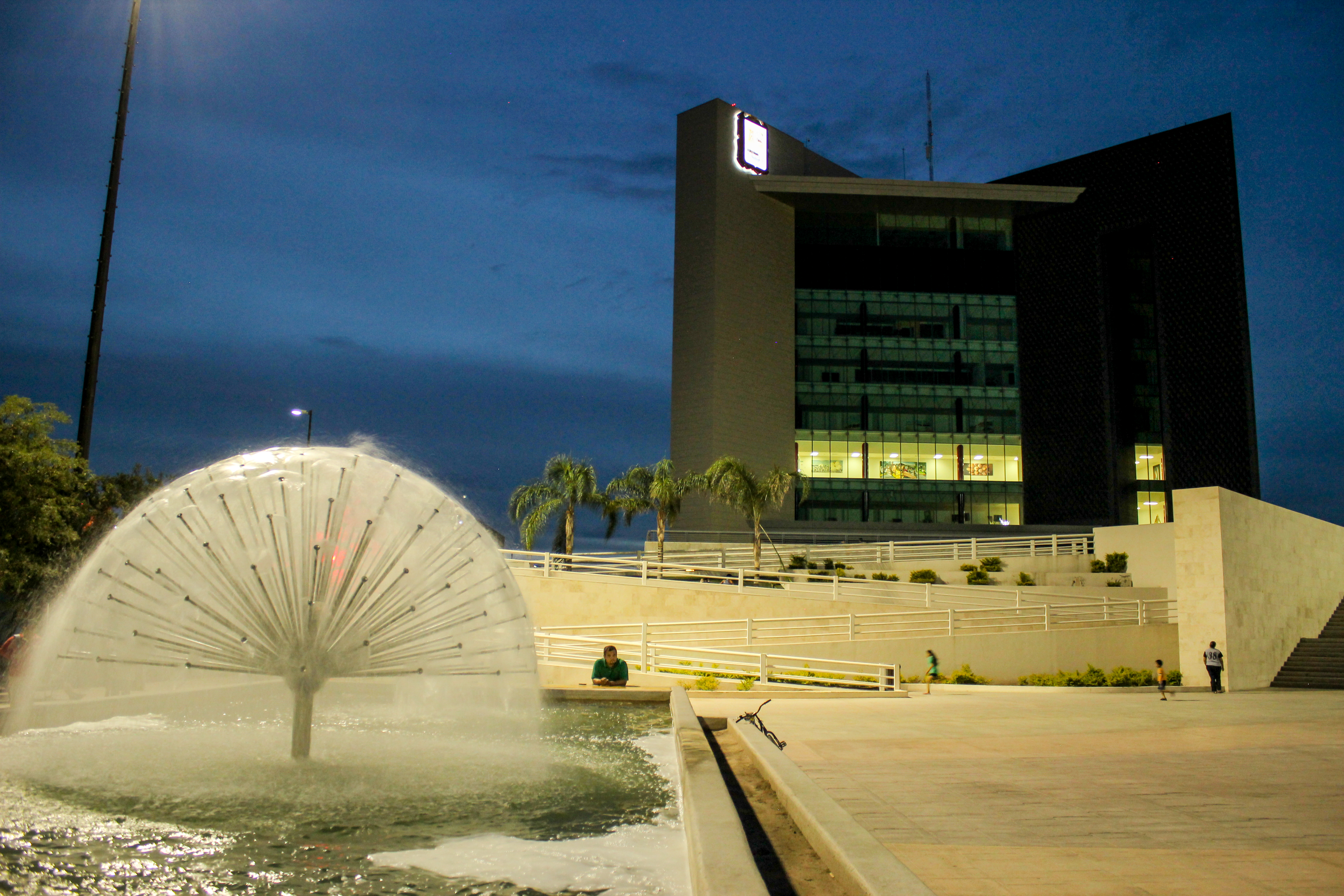 Fuente con forma de media esfera ubicada en la Plaza Mayor en Torreón. Coahuila, México.